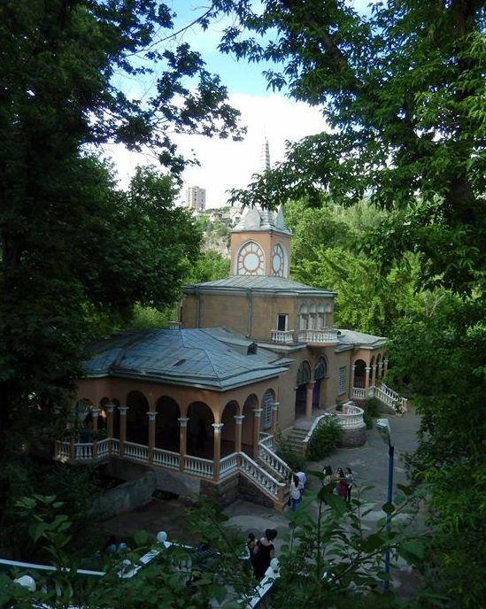 Մանկական երկաթուղի, Կայարանի շենքը